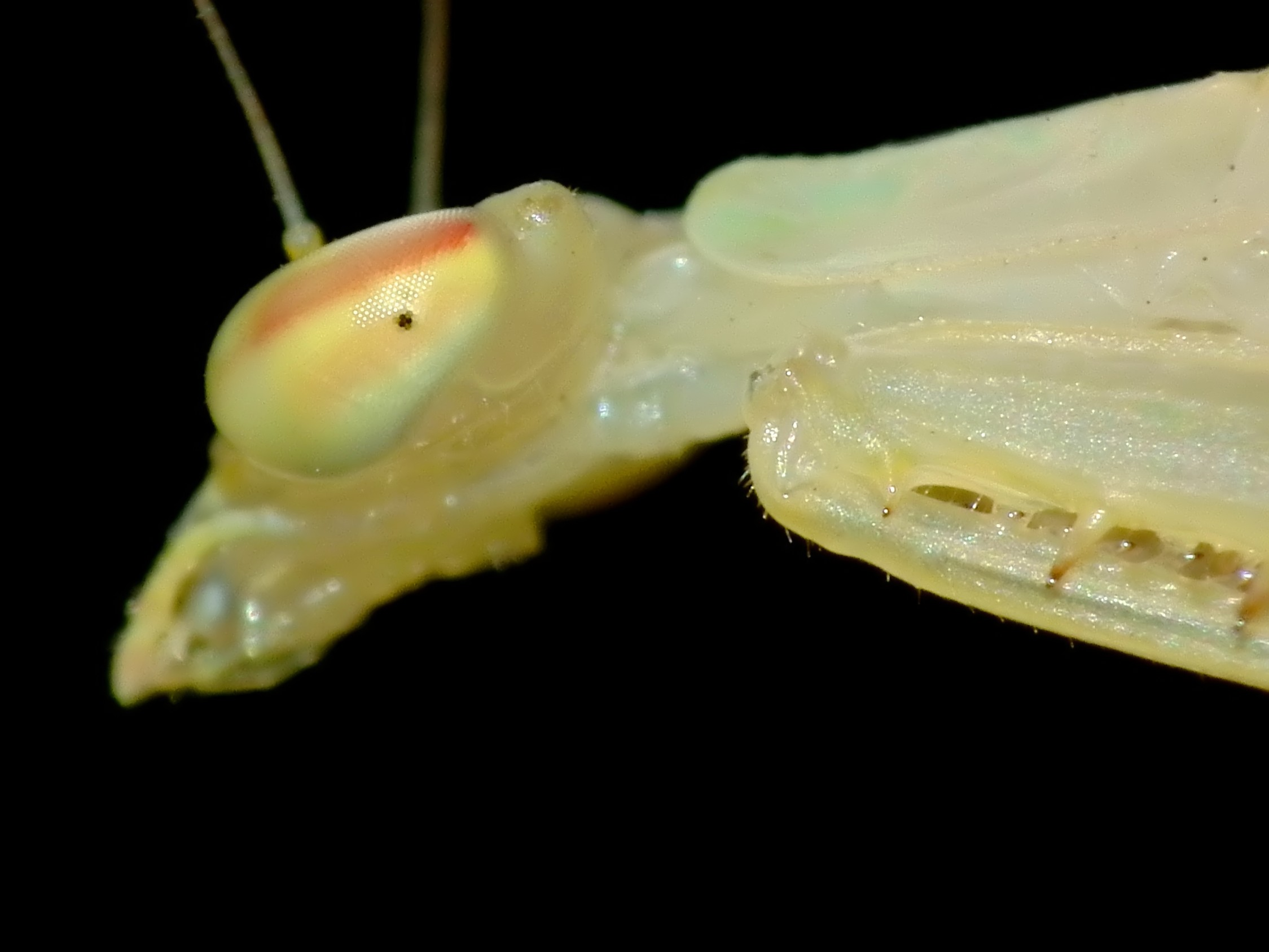 Saw at park area.